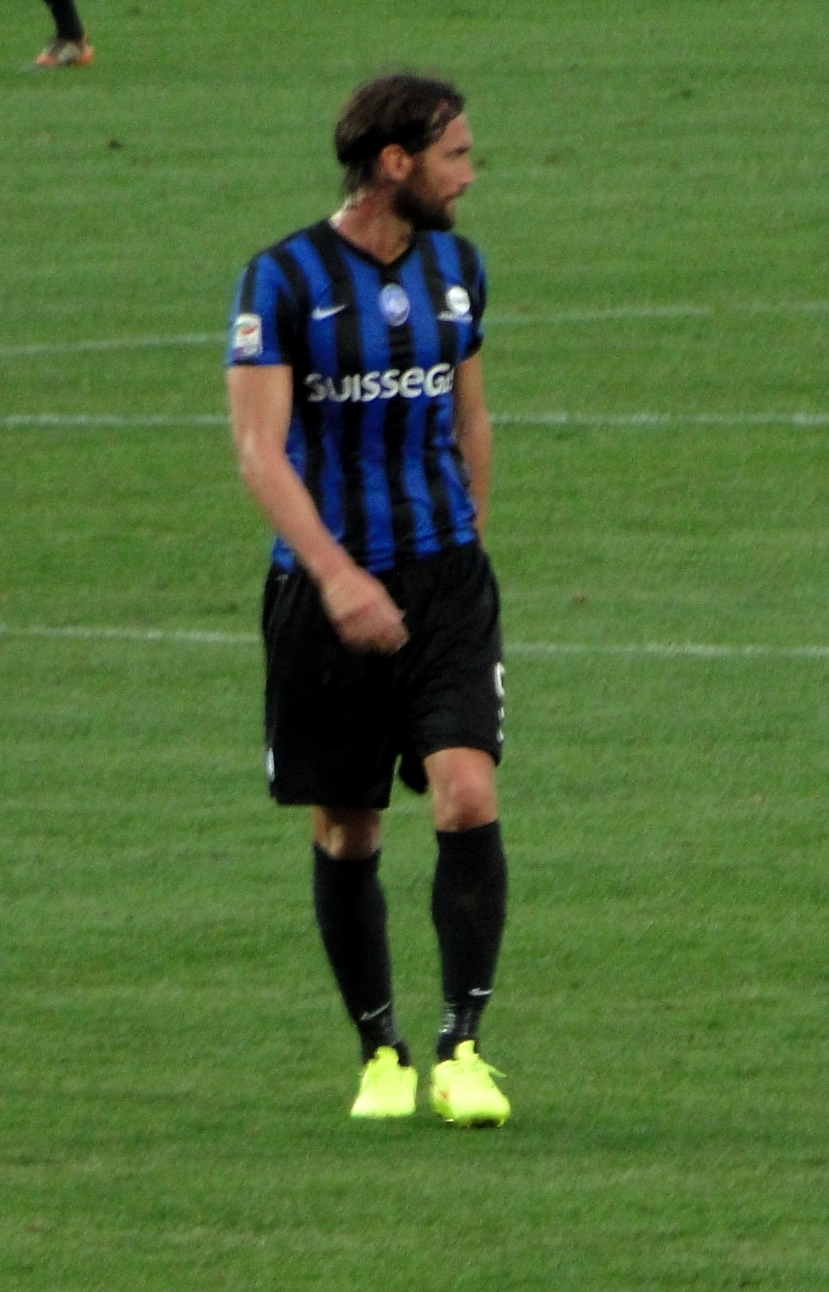 Rolando Bianchi, calciatore italiano, con la maglia dell'Atalanta.